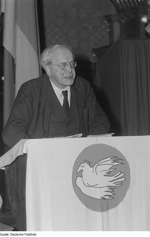 Original image description from the Deutsche Fotothek Porträt des Pfarrers Professor D. Johannes Herz